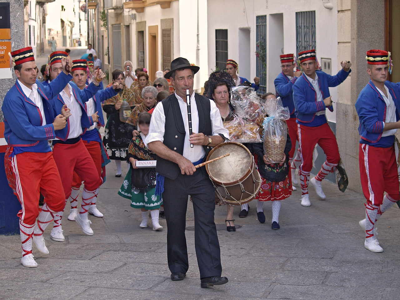 Danzantes y "rosqueras" traen ofrendas al Cristo de la Caridad (20 de julio)que serán a continuación subastadas. Losar de la Vera, Cáceres, España.